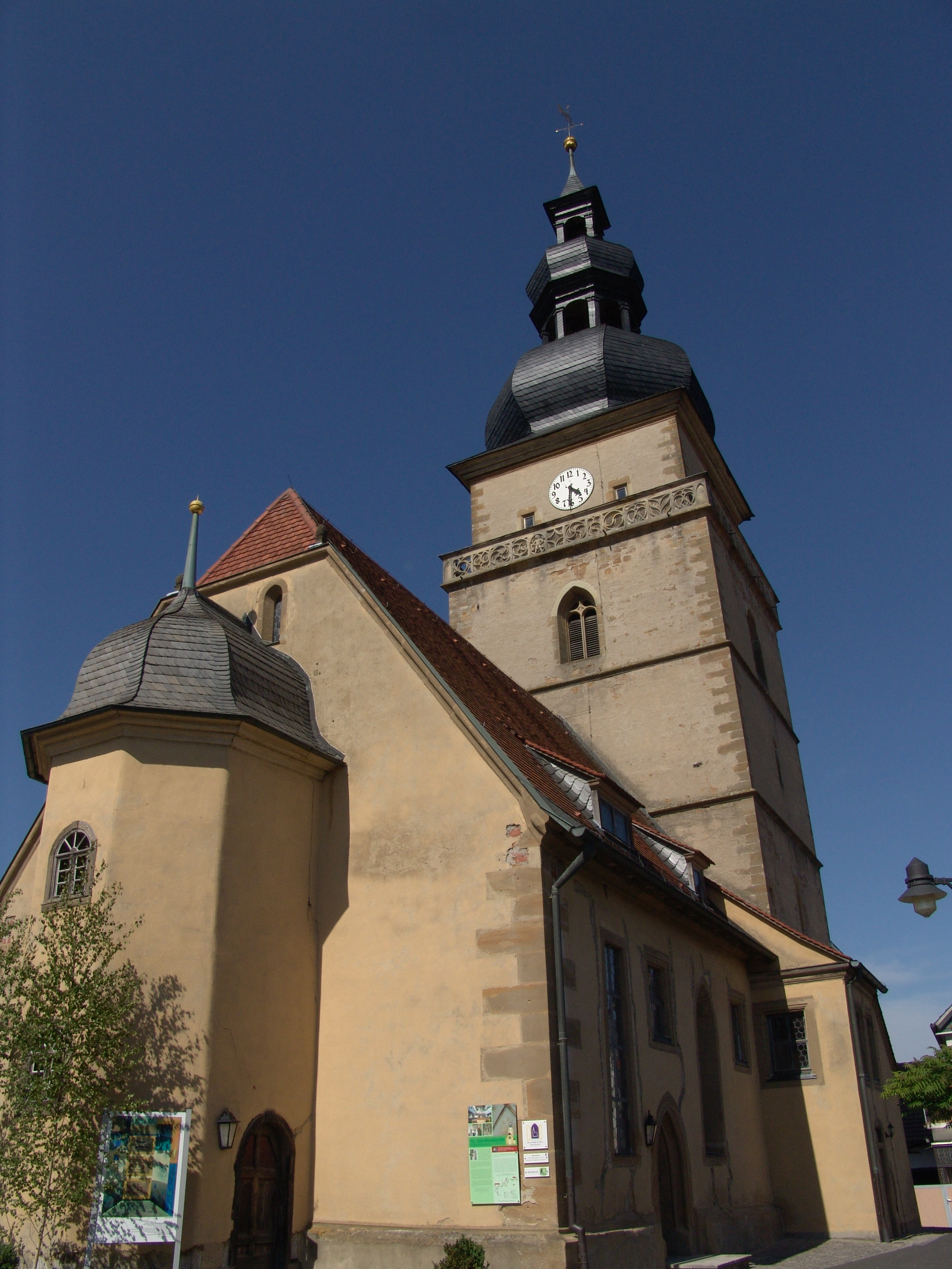 evang.-luth. Kirche St. Jakobus in Irmelshausen